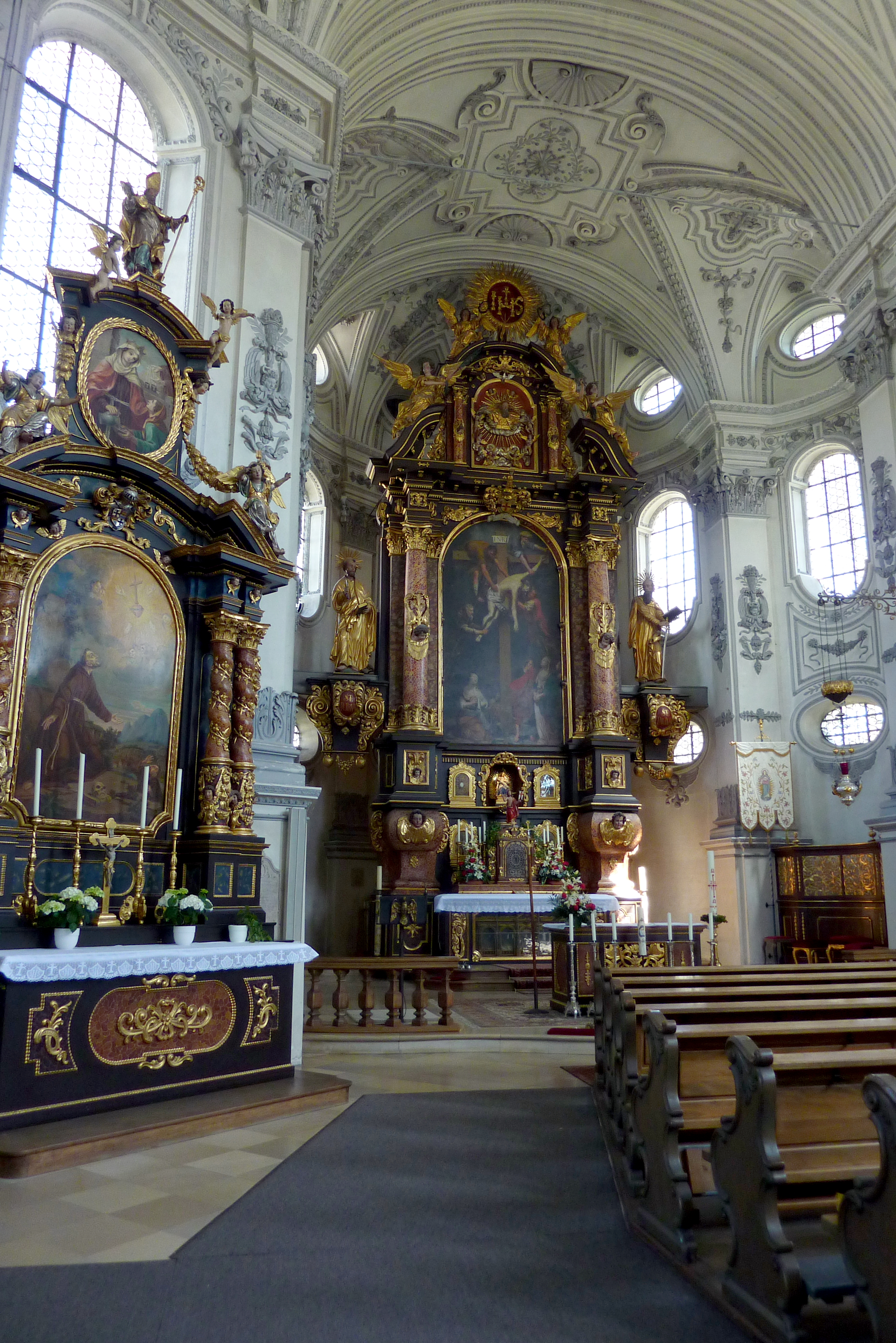 Wallfahrtskirche Maria Birnbaum in Sielenbach im Landkreis Aichach-Friedberg (Bayern), Chorraum